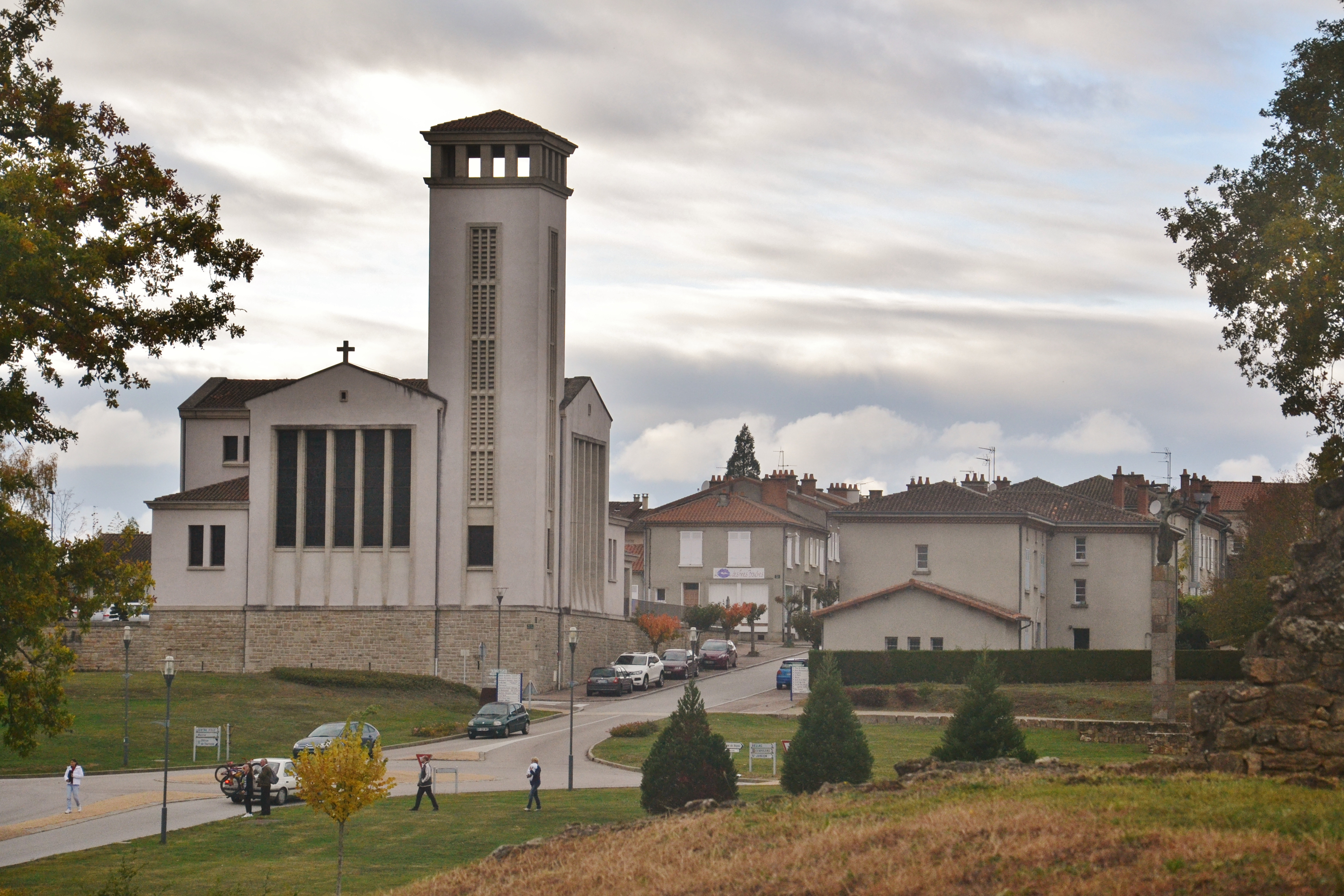 L'entrée du "nouveau village" d'Oradour-sur-Glane (Haute-Vienne), vu depuis le village-martyr détruit par les SS en 1944.